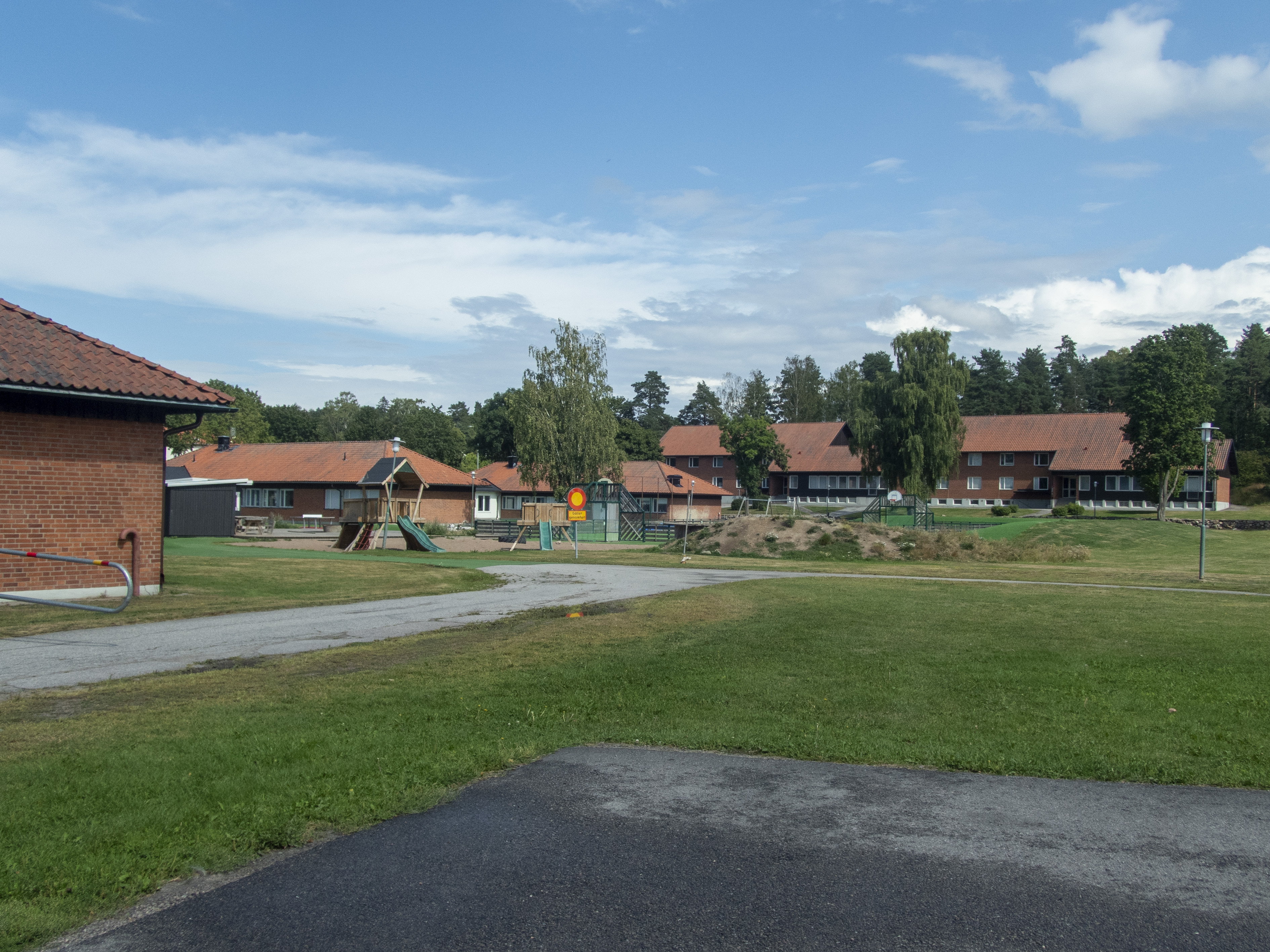 Johannesberg, institutionsbyggnader uppförda 1964. Arkitekt: Leo Uulas